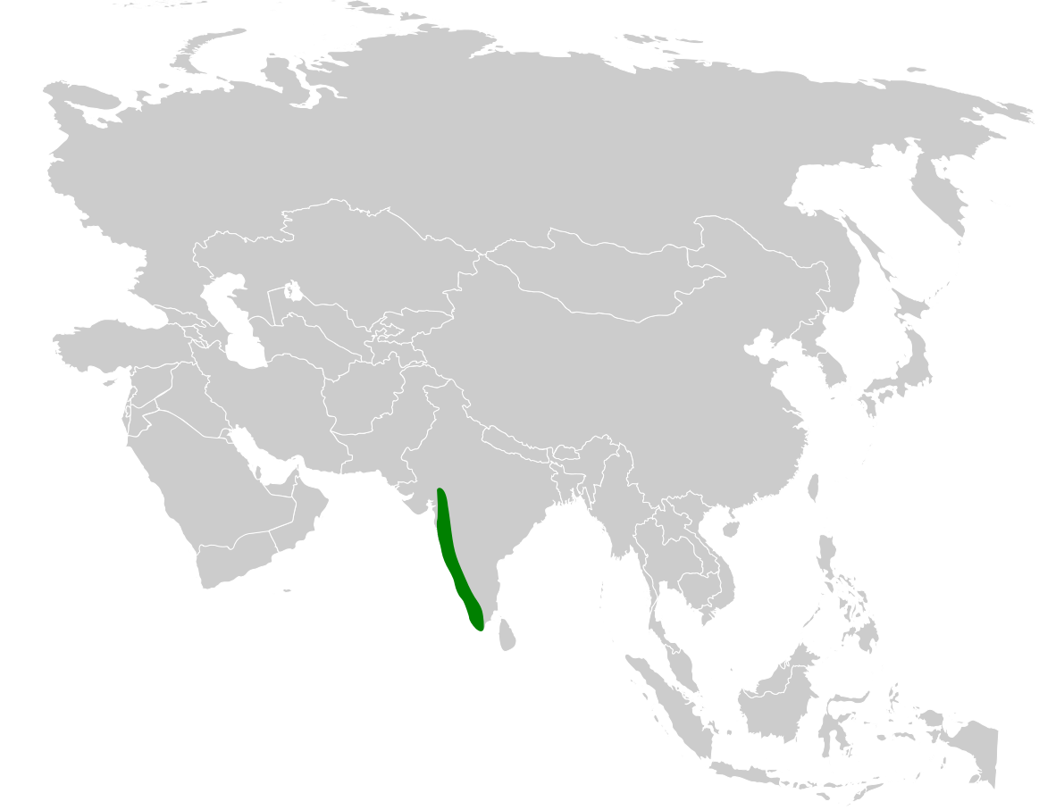 Galerida malabarica distribution map, based on